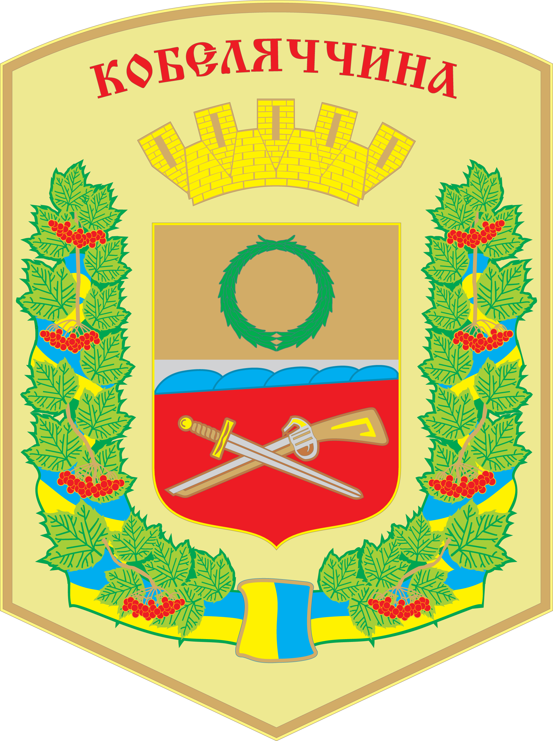 Герб Кобеляцького району